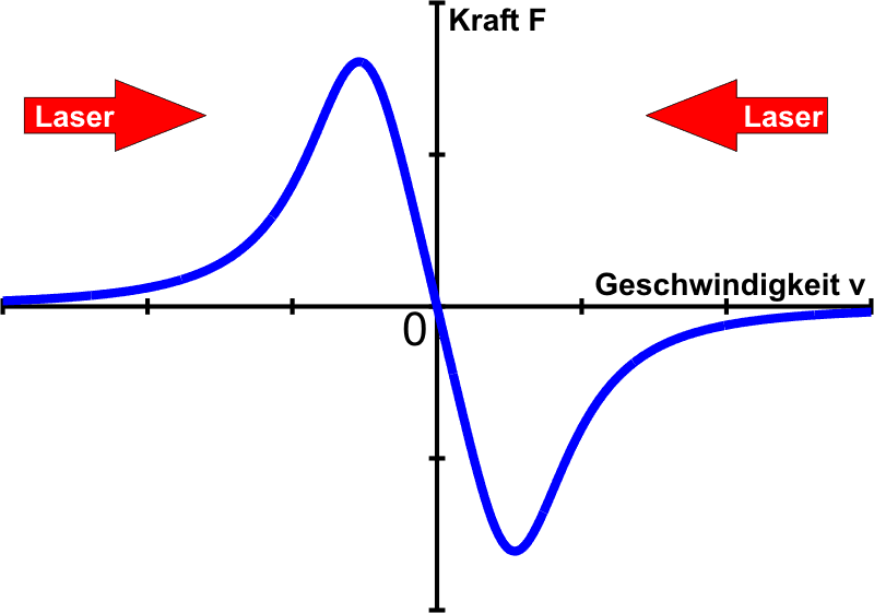 Geschwindigkeitsabhängige Kraft bei Laserkühlung